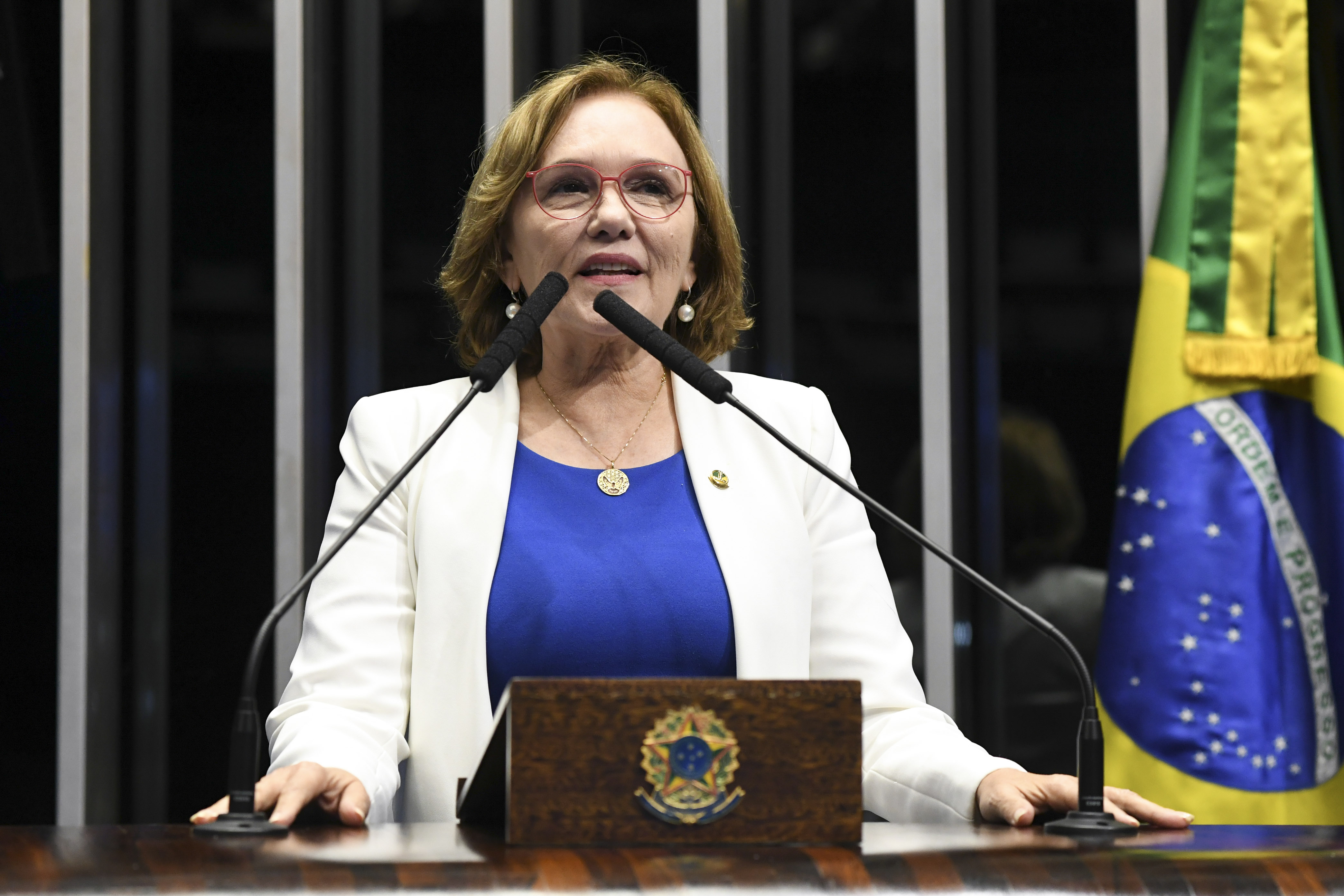 Plenário do Senado Federal durante sessão deliberativa ordinária. Em discurso, à tribuna, senadora Zenaide Maia (Pros-RN). Foto: Jefferson Rudy/Agência Senado